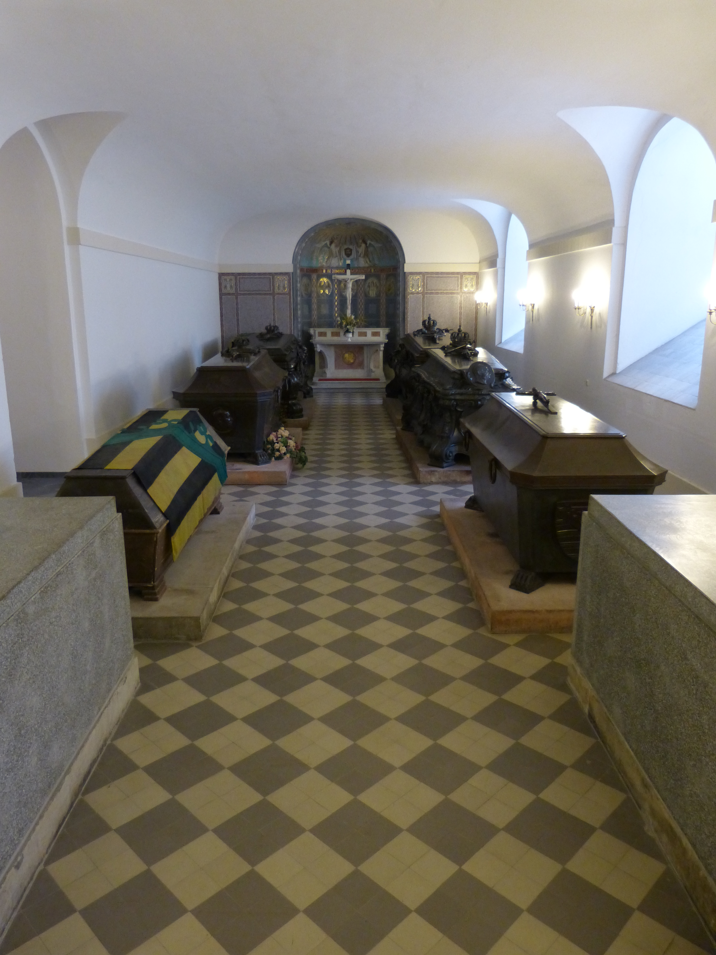 Neue Gruft der Wettiner-Gruft der Katholischen Hofkirche in Dresden, Sachsen